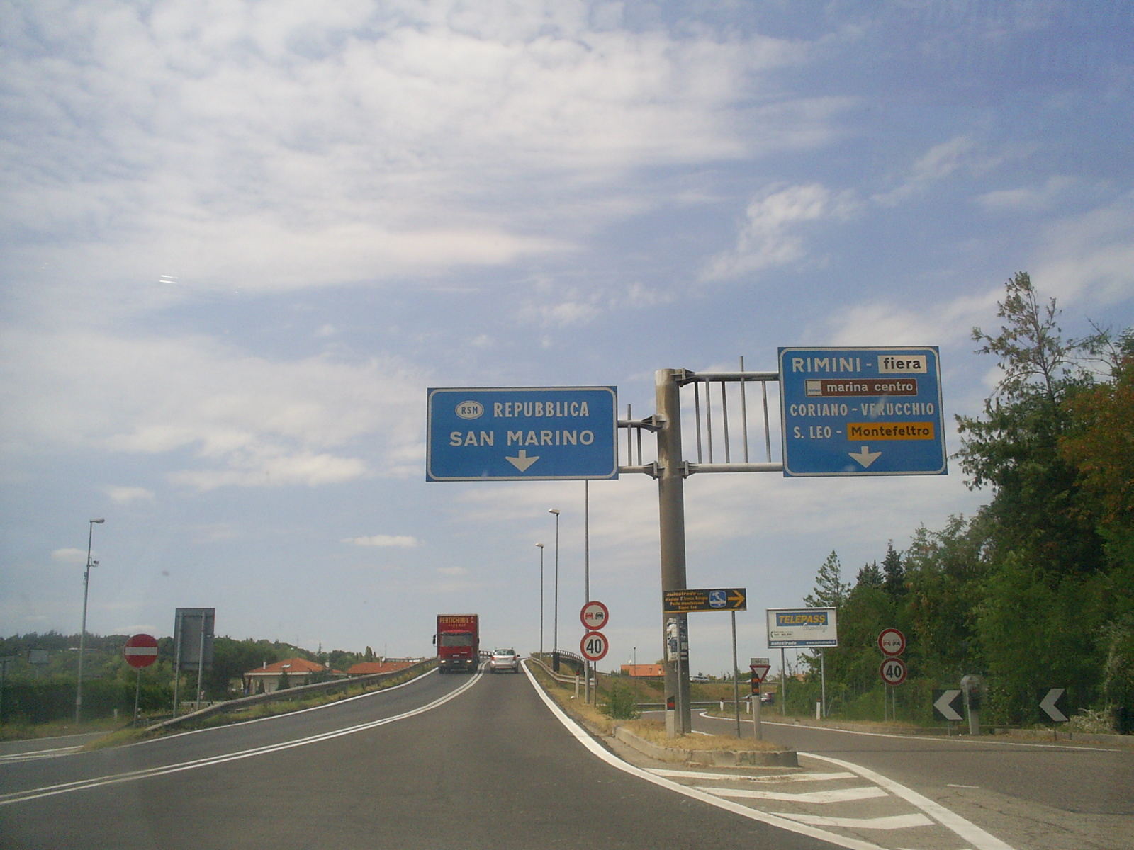 droga krajowa SS72 - Włochy